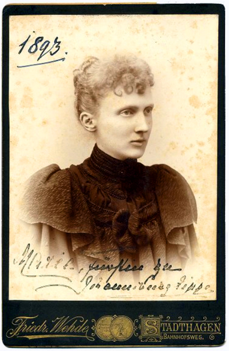 Kabinettfotografie mit einem Brustbild der Prinzessin Marie Anna von Sachsen-Altenburg, Fürstin zu Schaumburg-Lippe, von dieser handschriftlich datiert und signiert 1893; Atelieraufnahme des Hoffotografen Friedrich Wehde, hier mit seiner Anschrift Bahnhofsweg 6 in Stadthagen...